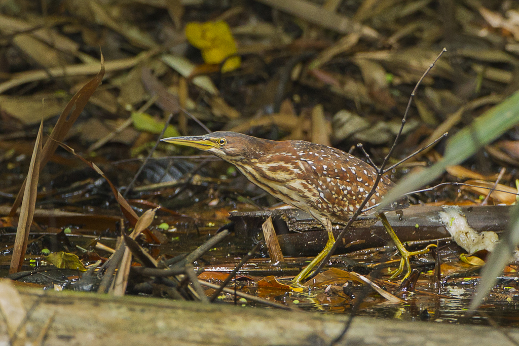 Schrenk's Bittern fem - Kang Kra Chan - Thailand_S4E4834